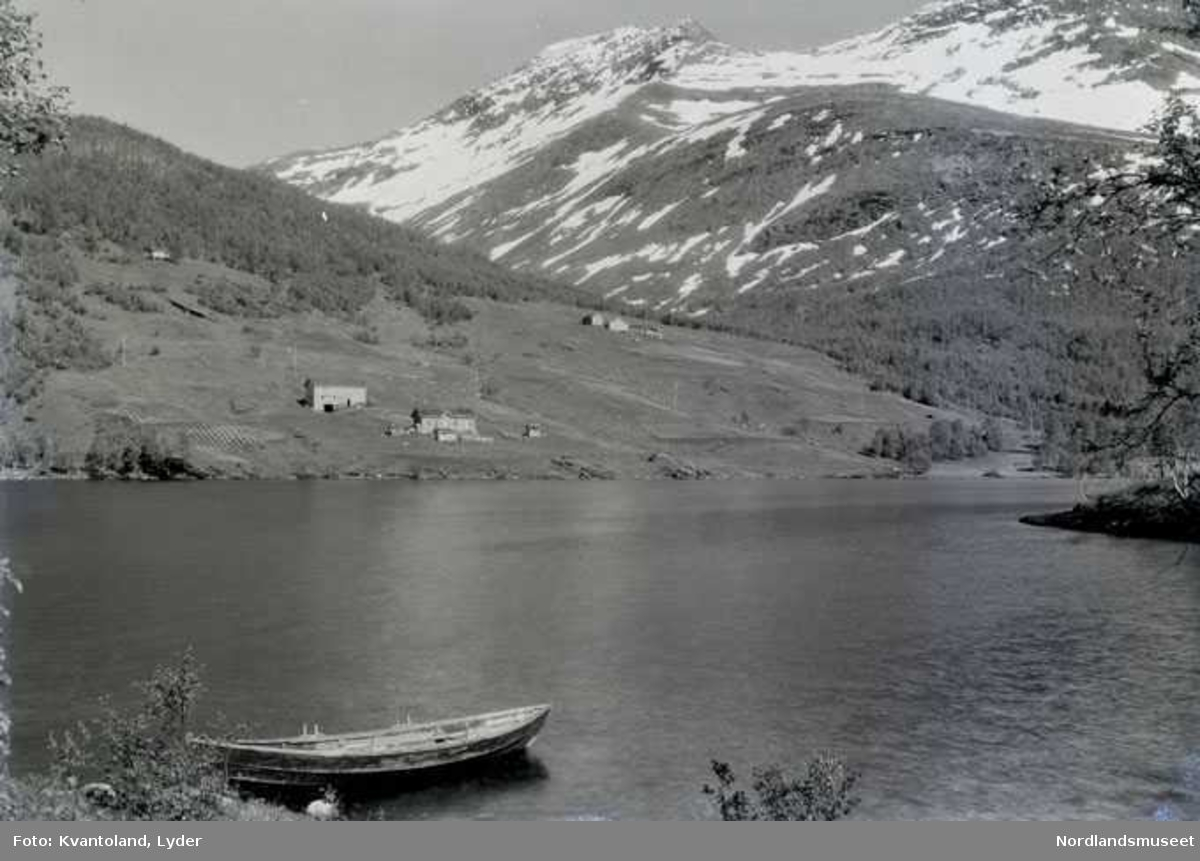 Horndalsvatnet, 1934